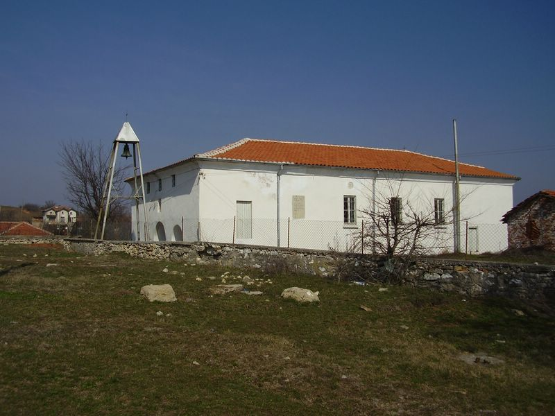 Село Капитан Петко войвода